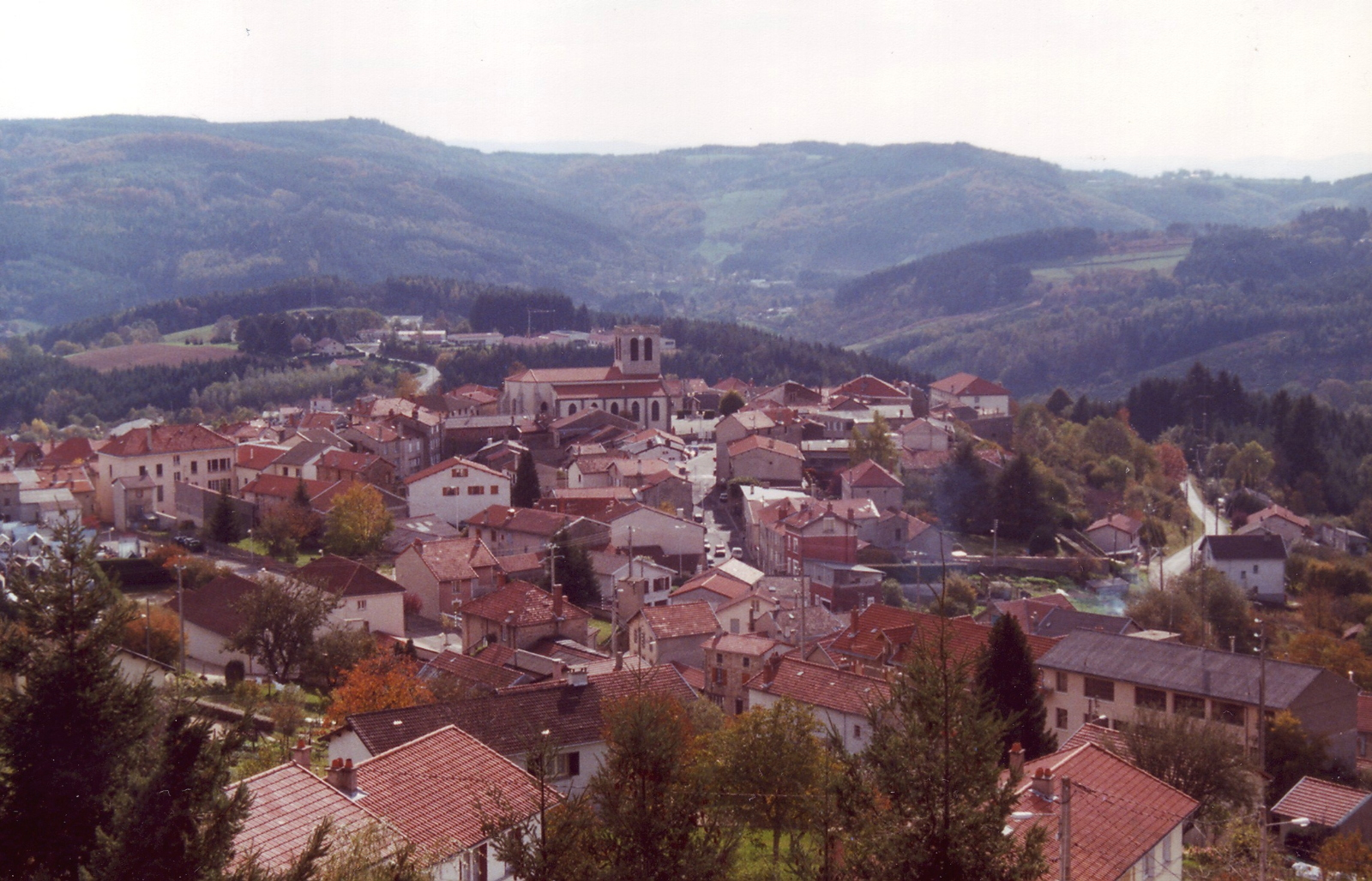 Vue du bourg de St Rémy sur Durolle